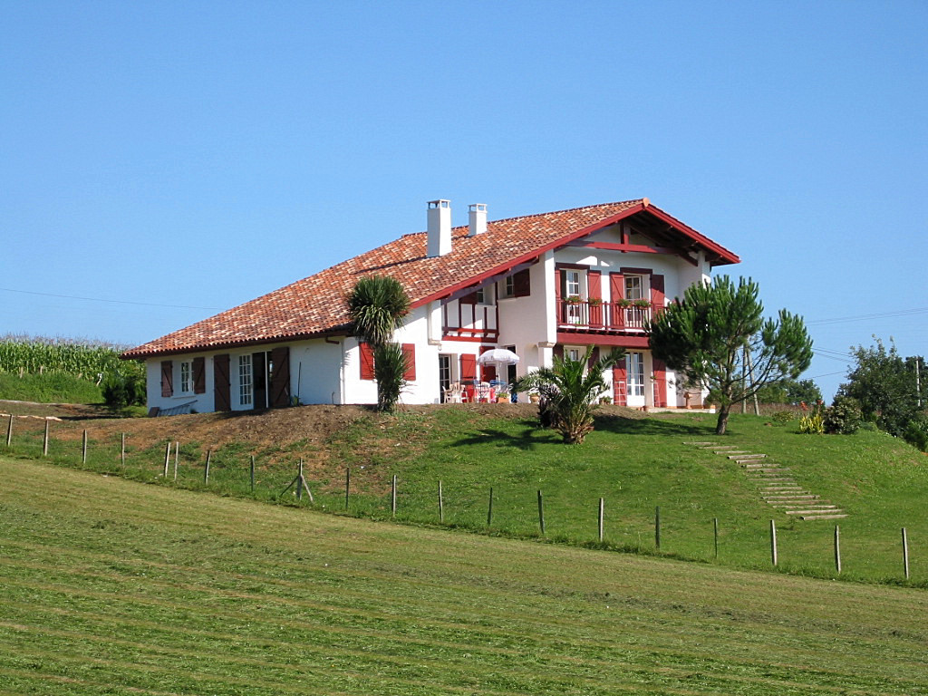 Ahetze, chemin d'Harrieta, photo prise le 14/08/02 par Harrieta171